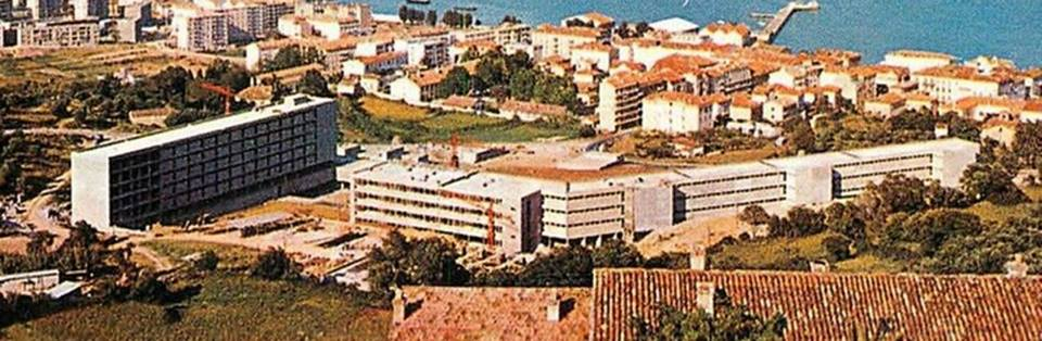 Le lycée Laetitia-Bonaparte en construction (1963)